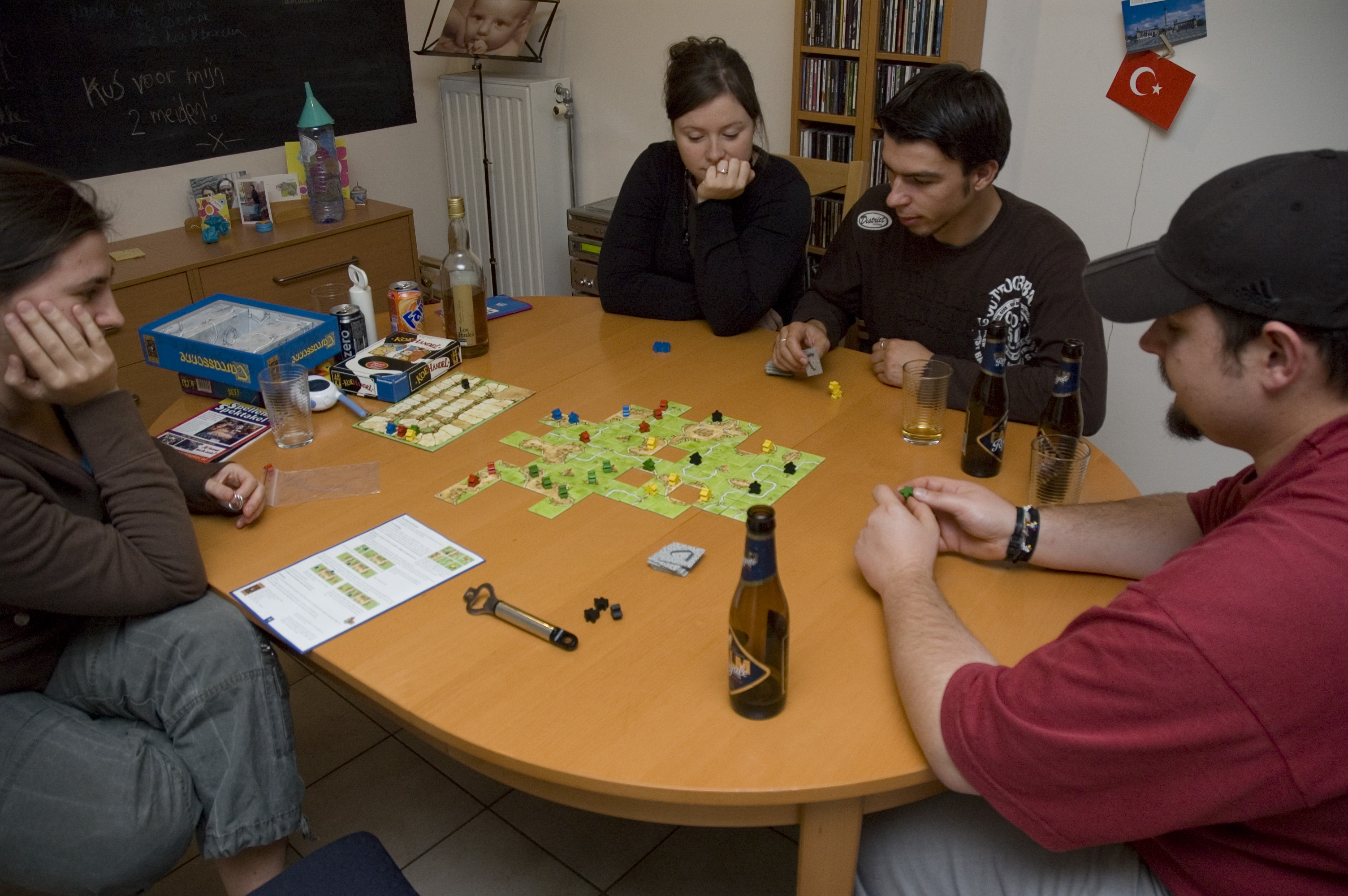 Une partie du jeu Carcassonne